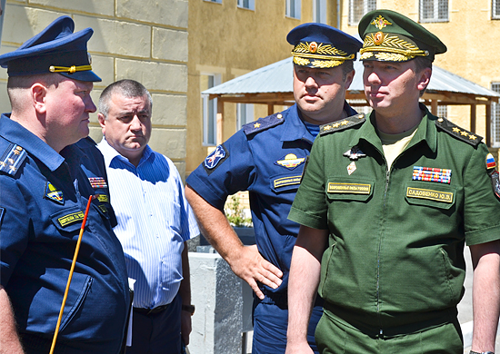 Заместитель Министра обороны России — руководитель Аппарата Министра обороны РФ генерал-полковник Юрий Садовенко во время рабочей поездки в десантно-штурмовой бригаде Воздушно-десантных войск, дислоцированной в городе Камышин (Волгоградская область).